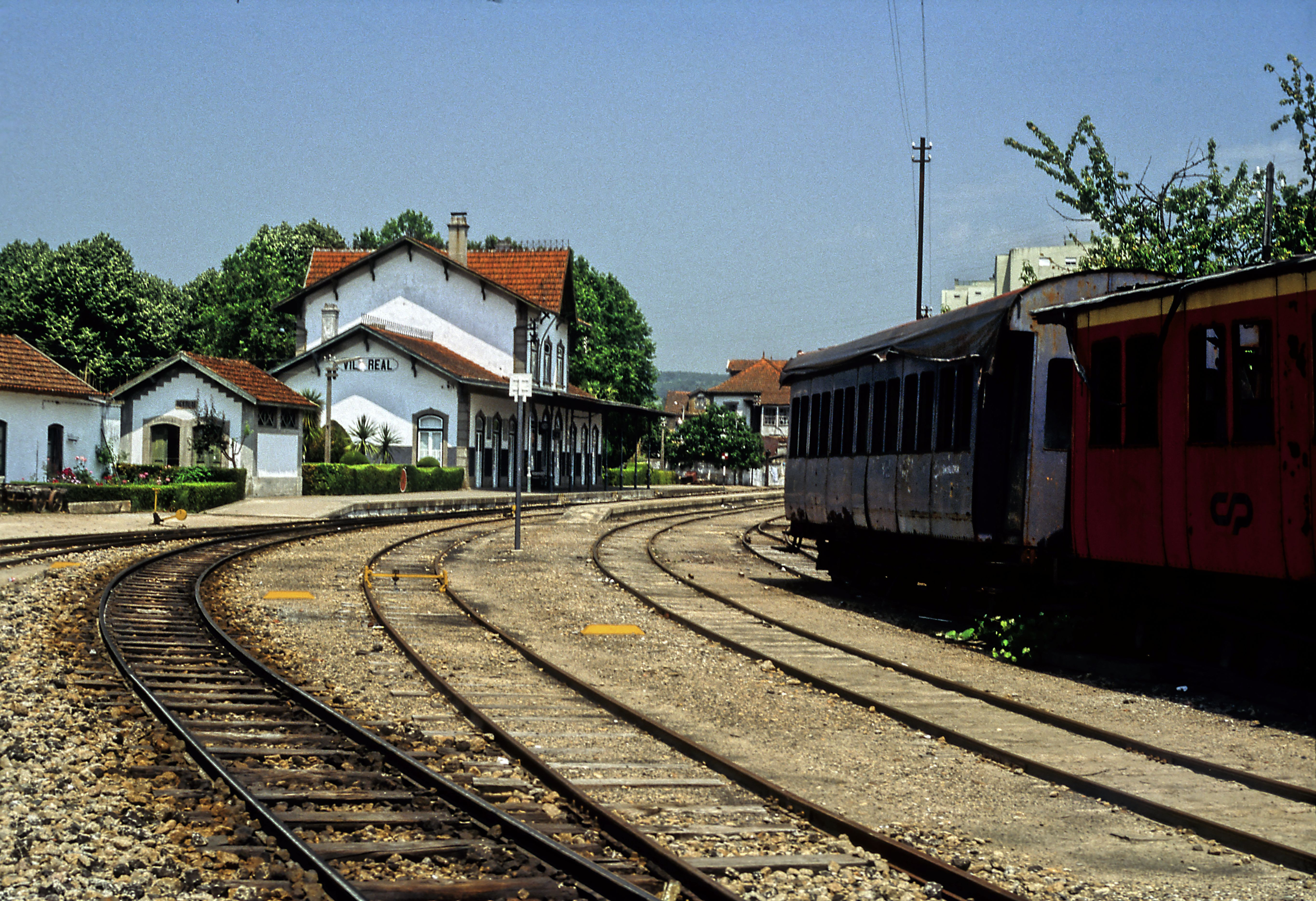 Bf Vila Real an der Linha do Corgo, aus Richtung Régua